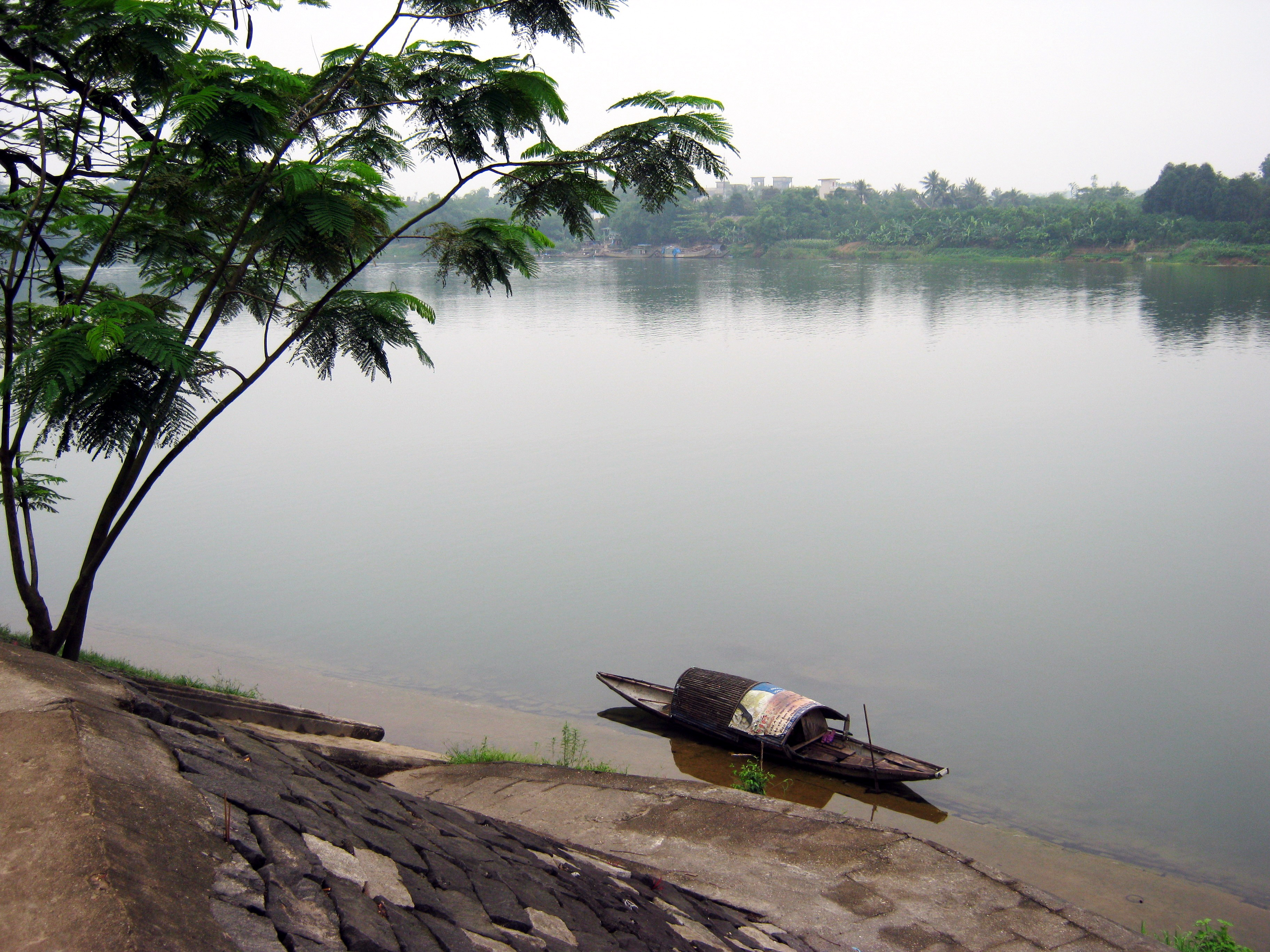 Sông Hương, đoạn ở trước chùa Thiên Mụ (Huế, Việt Nam).